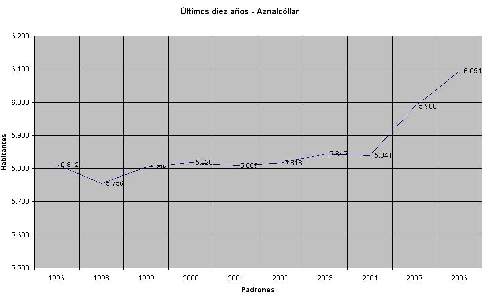 Evolución de la población en Aznalcóllar durante el periodo 1996-2006